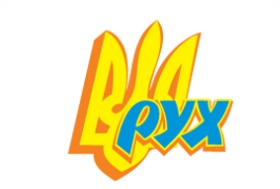 Логотип Народного Руху України